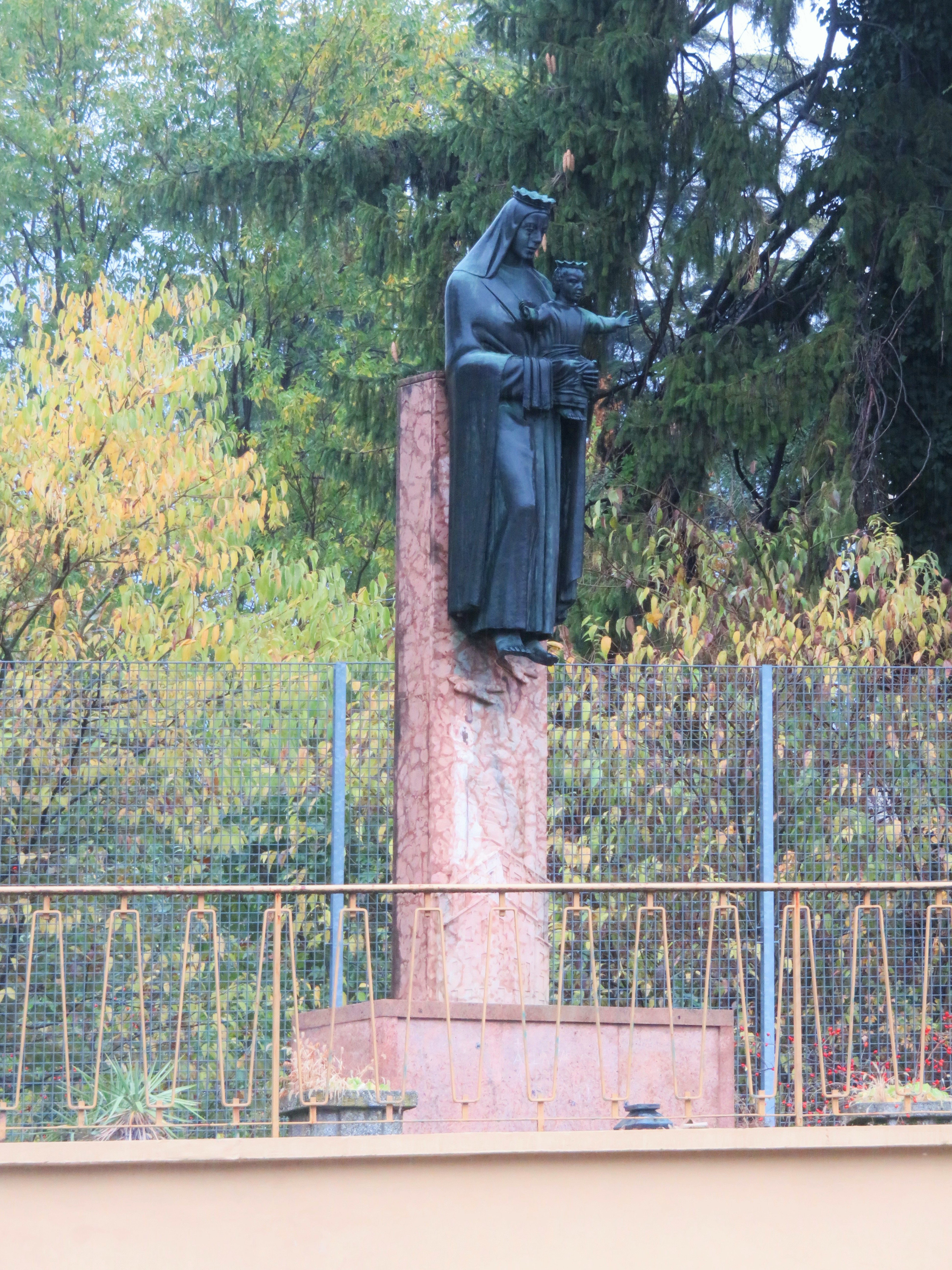 Monumento frutto di un voto delle zigherane fatto alla Vergine Ausiliatrice (patrona di Rovereto) per salvare il personale e la manifattura dai bombardamenti durante la seconda guerra mondiale. Ai piedi della Madonna si distinguono, scolpiti nella colonna che regge la statua, oltre ai monti trentini anche i bombardieri i volo, idealmente indirizzati lontano dall'opificio dalla Madonna.